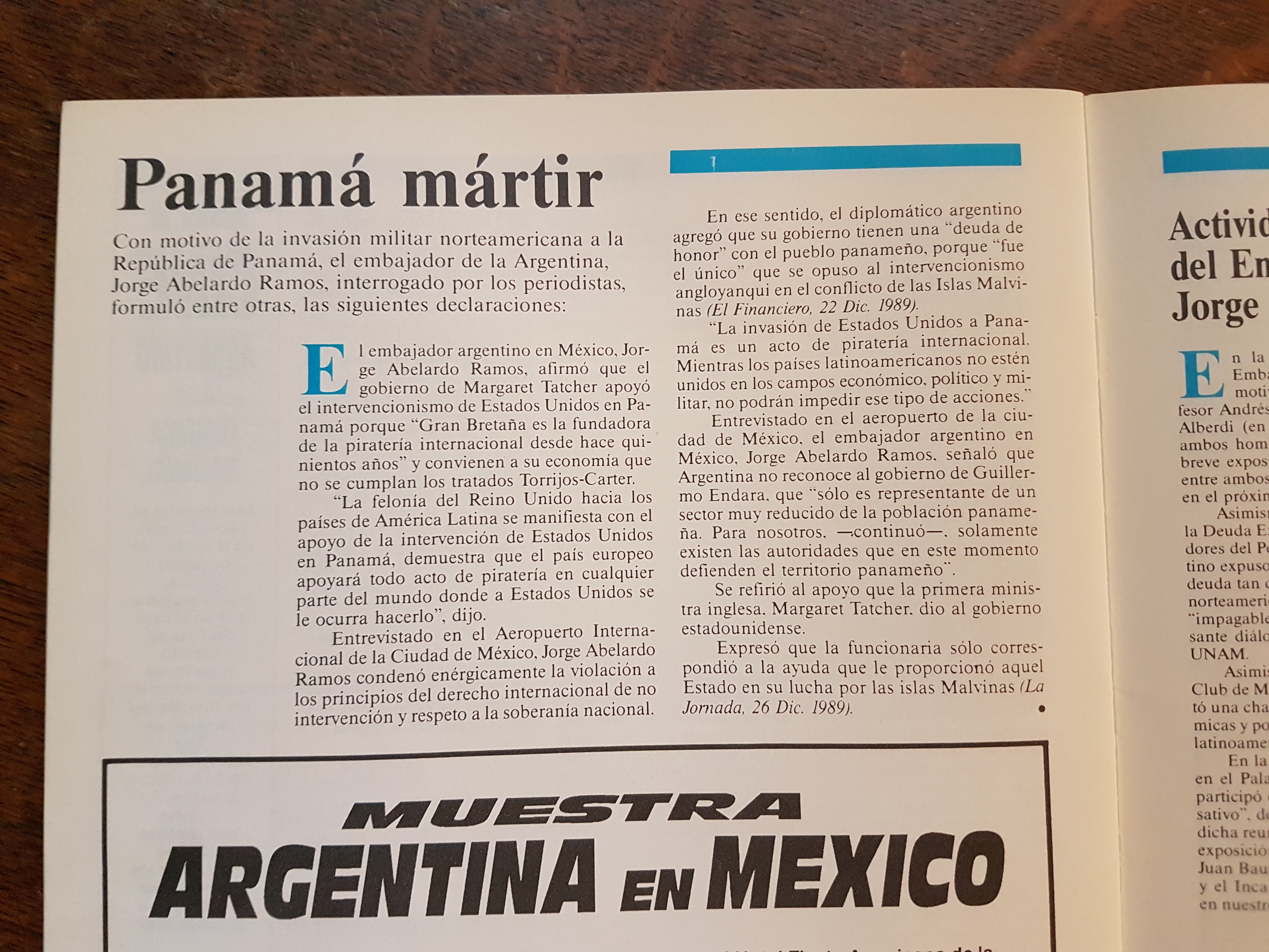 Repudios del Embajador Jorge Abelardo Ramos al Imperialismo